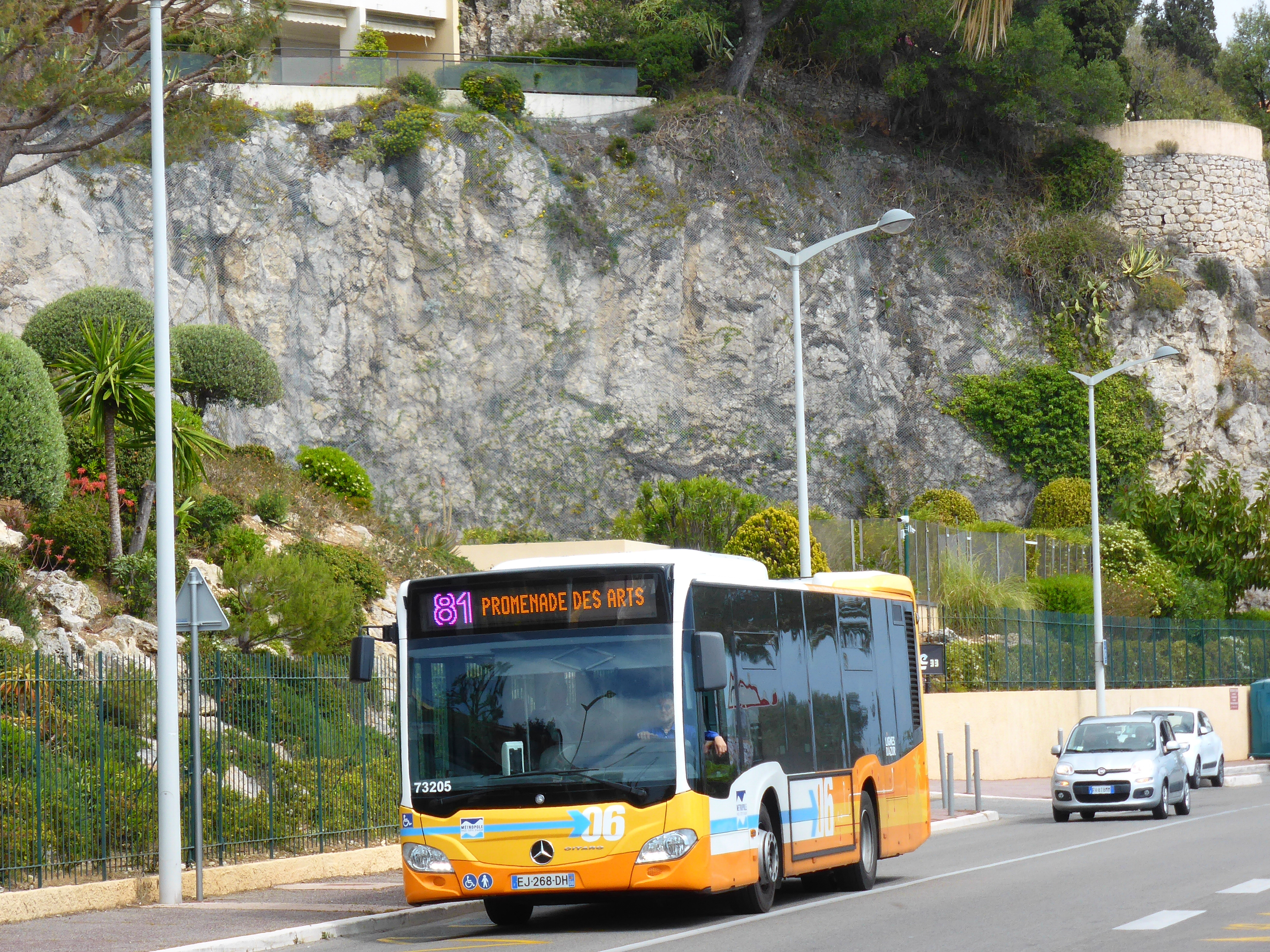 Un Citaro K C2 du réseau Ligne d'Azur